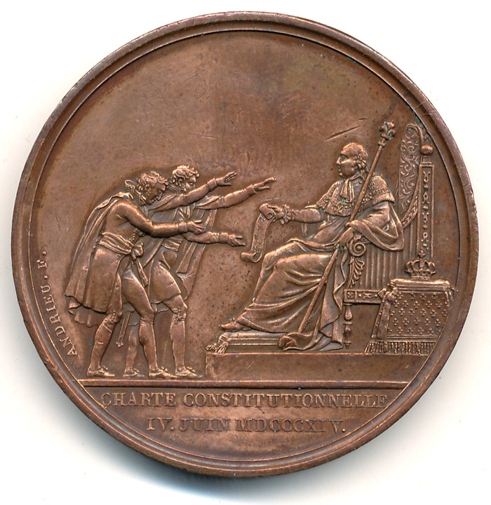 Louis XVIII, Représentation signée Andrieu de la scéance solennelle de la promulgation de la Charte Constitutionnelle du 4 juin 1814. Médaille en cuivre, 41mm, revers